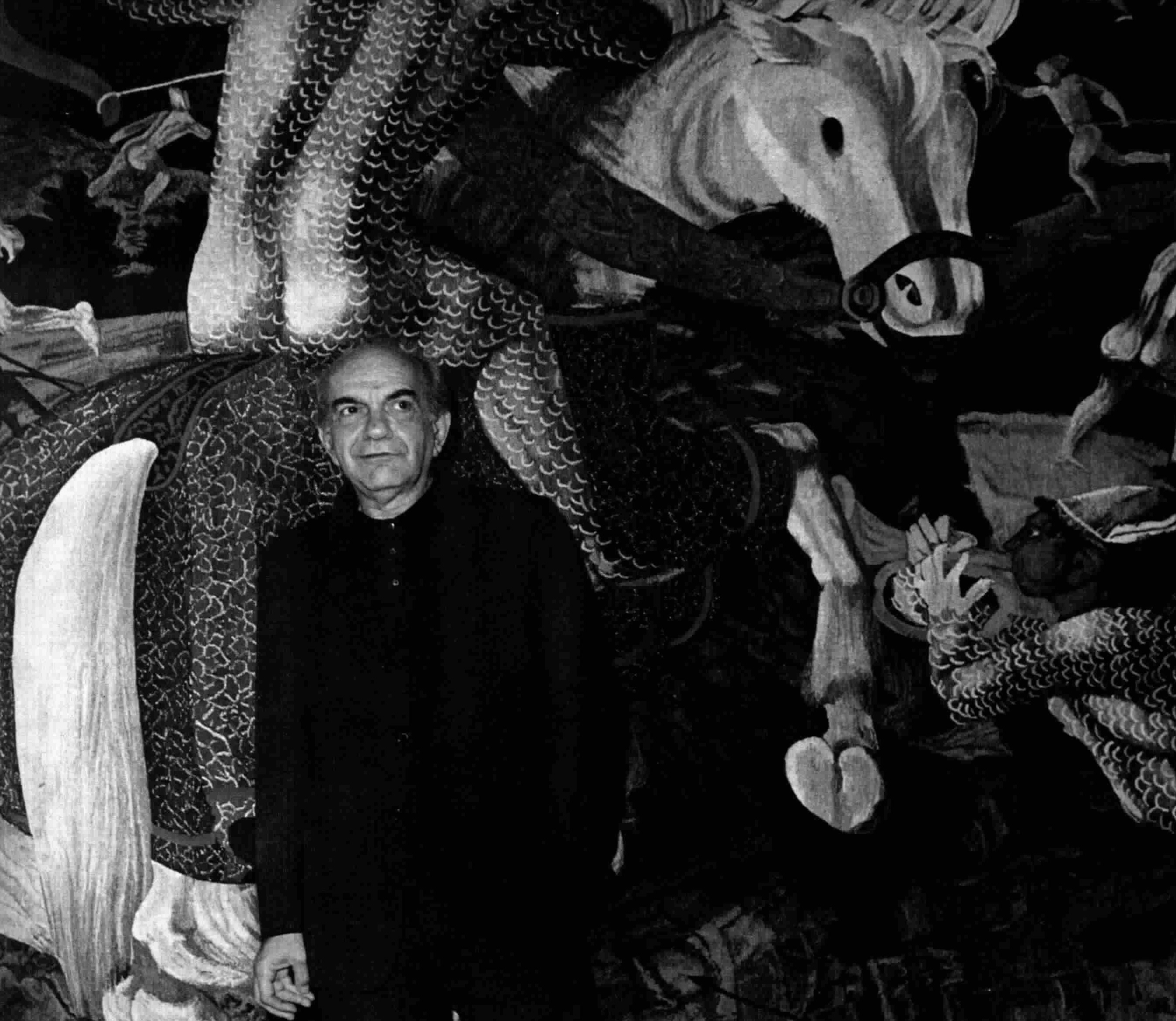 Italian painter Corrado Cagli at his studio in Rome